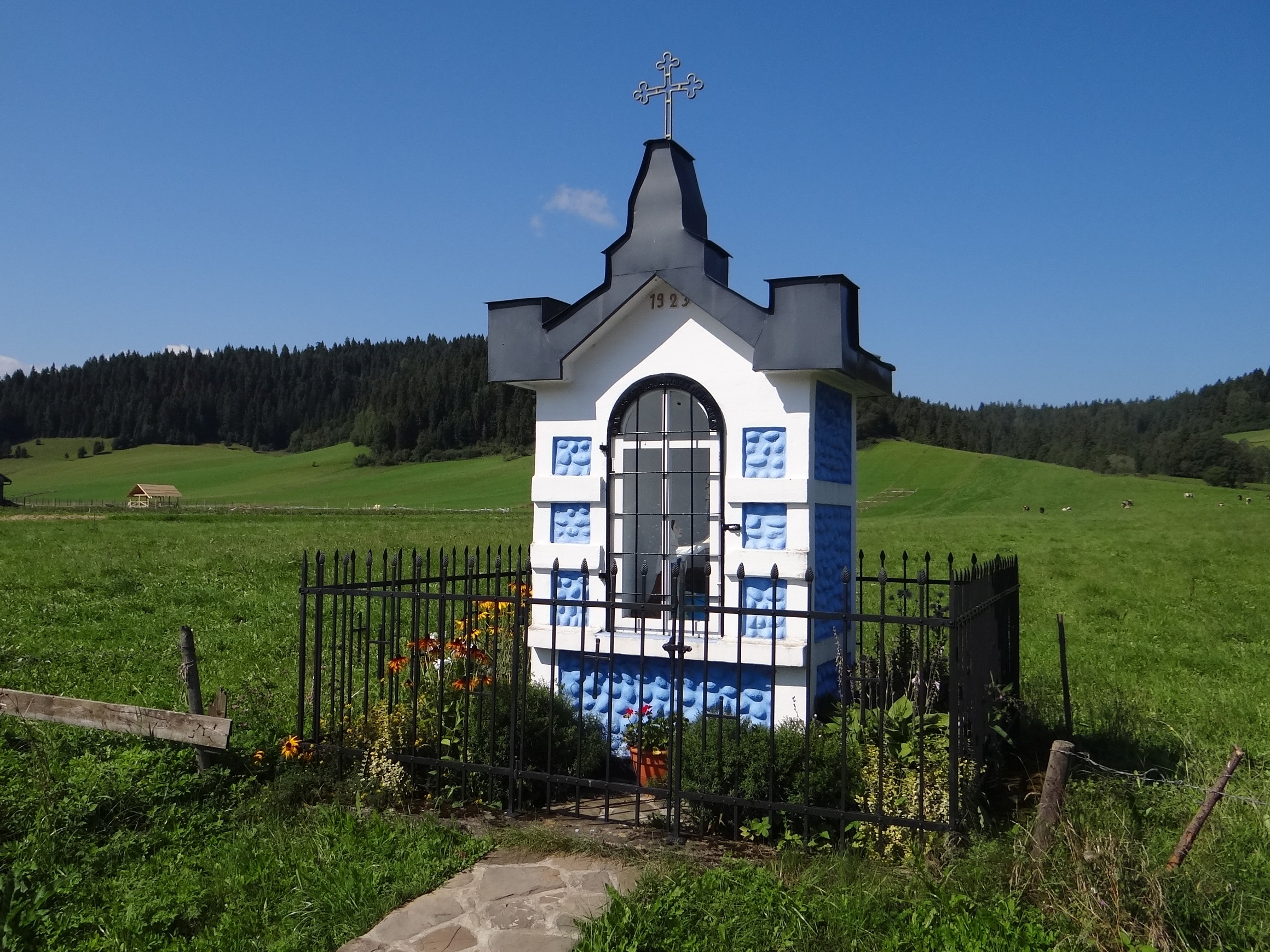 Kacwin. Kapliczka przy drodze do Osturni